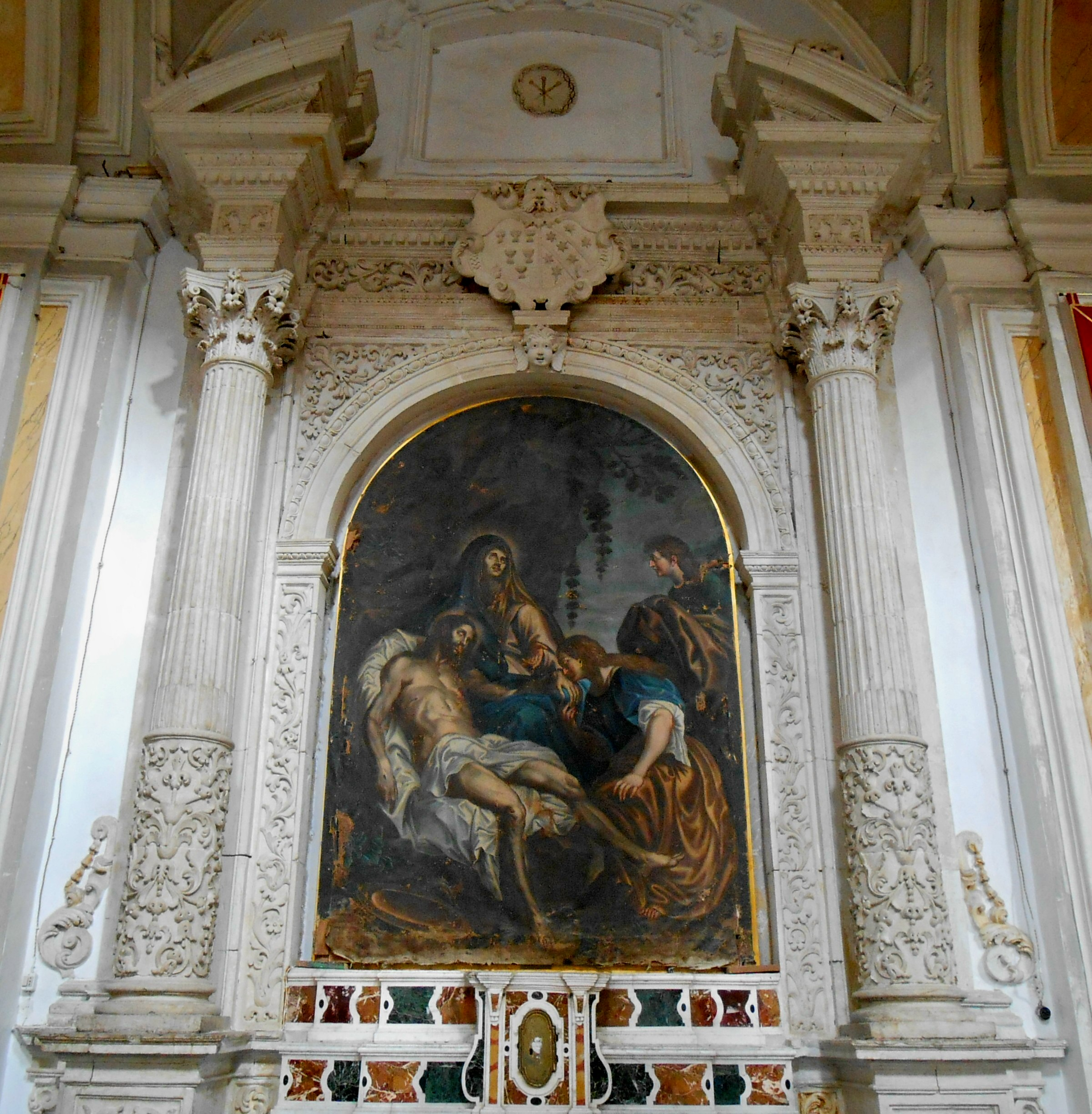 Cappella della Pietà, sec. XVII, da San Nicolò il Vecchio presso la chiesa madre.